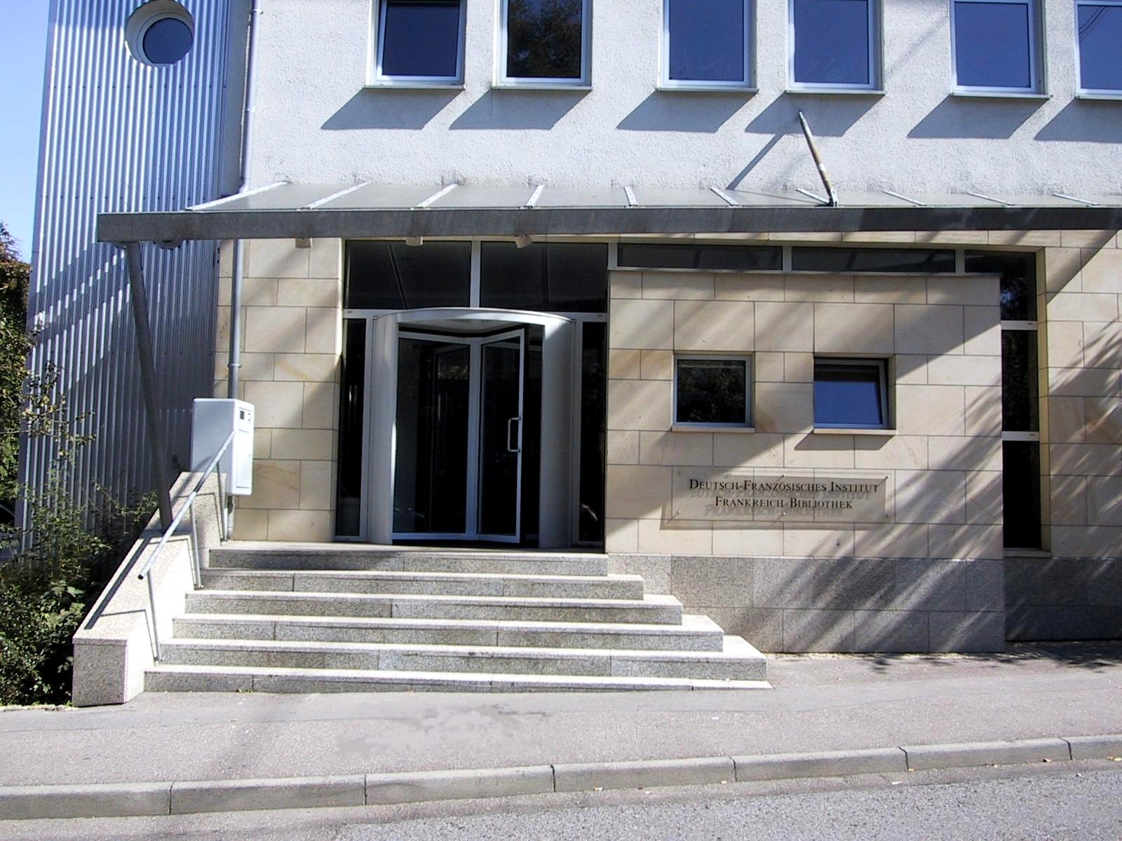 DFI-Bibliothek in Ludwigsburg (c) Deutsch-Französisches Institut / Ludwigsburg e.V. 2006